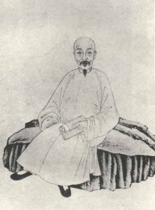 清代学者。 Wu Dazheng